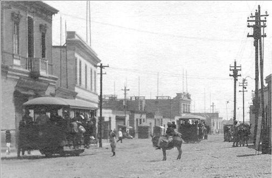 Foto de la Av. 28 de Julio que data de los inicios del Siglo XX